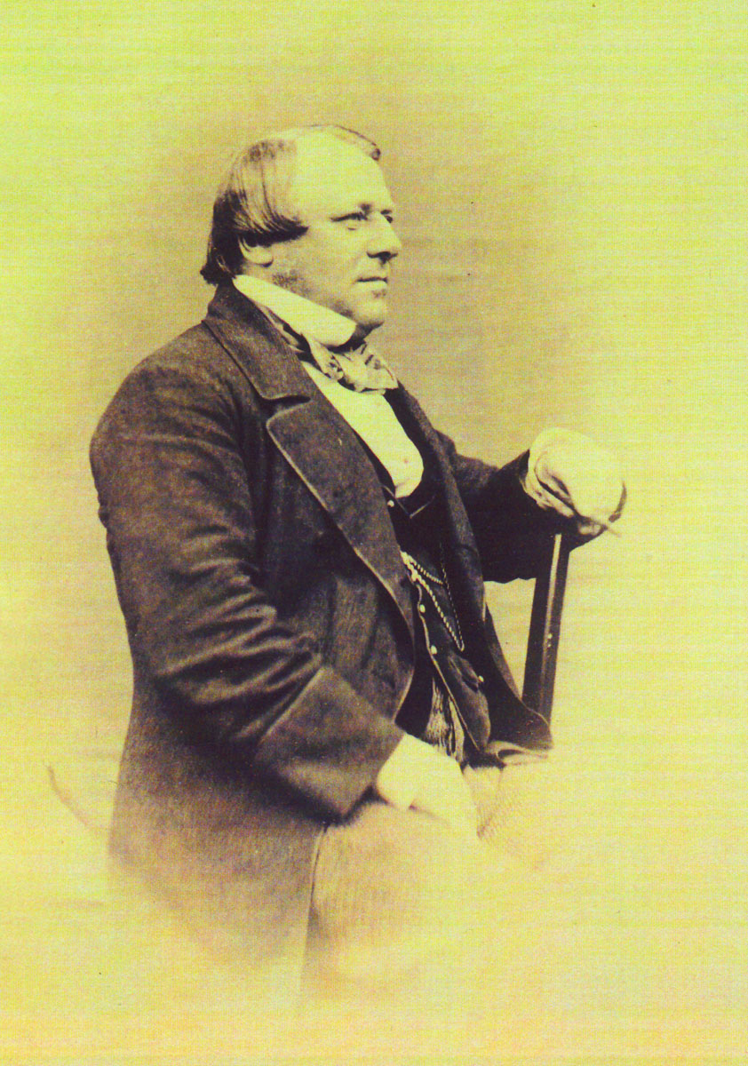 Positivo sobre cartulina, reportaje fotográfico sobre la construcción del ferrocarril de Santander a Alar del Rey (Palencia) Retrato de George Mould. Contratista constructor de la empresa constructora del ferrocarril cuando el Rey consorte Francisco de Asís Borbón visitó Santander para inaugurar las obras el 3 de mayo de 1852. La fotografía se tomó posteriormente en la fecha que se cita.